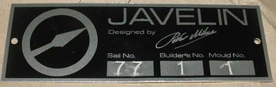 Registratie plaatje Javelin